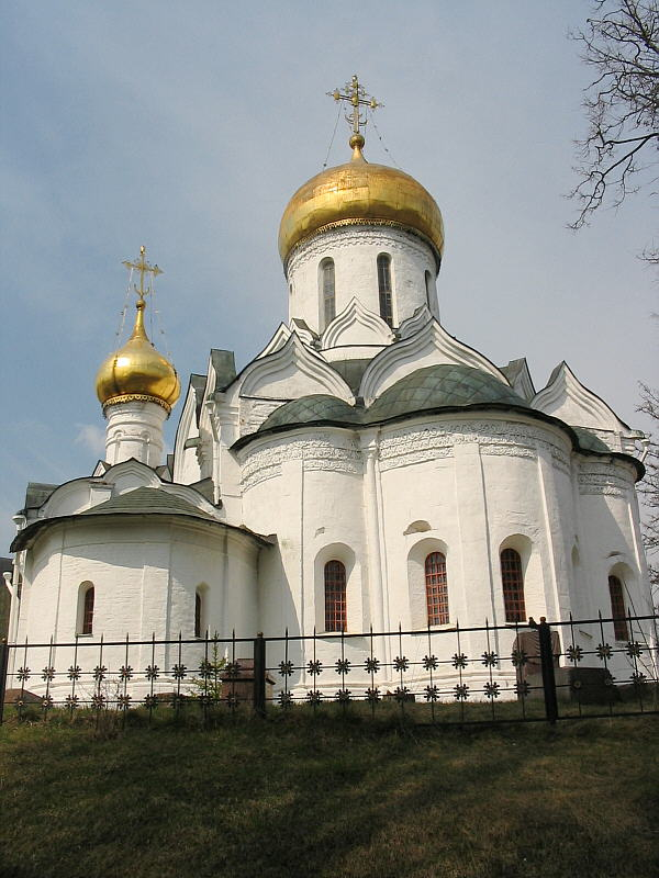 St. Savva Monastery in Zvenigorod, Russia Собор Рождества Богородицы (1405) Саввино-Сторожевского монастыря (близ Звенигорода)